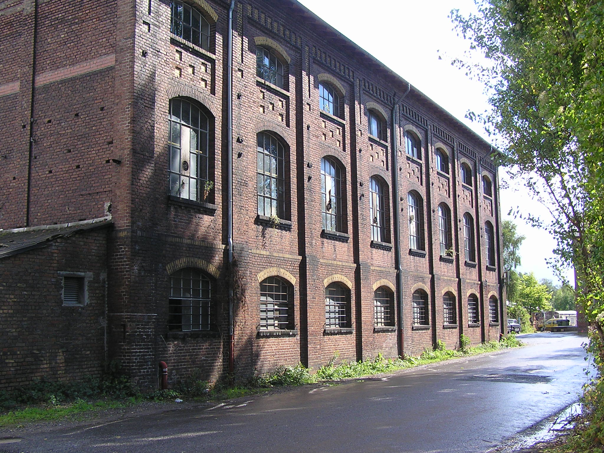 Betriebsgebäude (Lehrwerkstatt) der Zeche König Ludwig 1/2, Recklinghausen